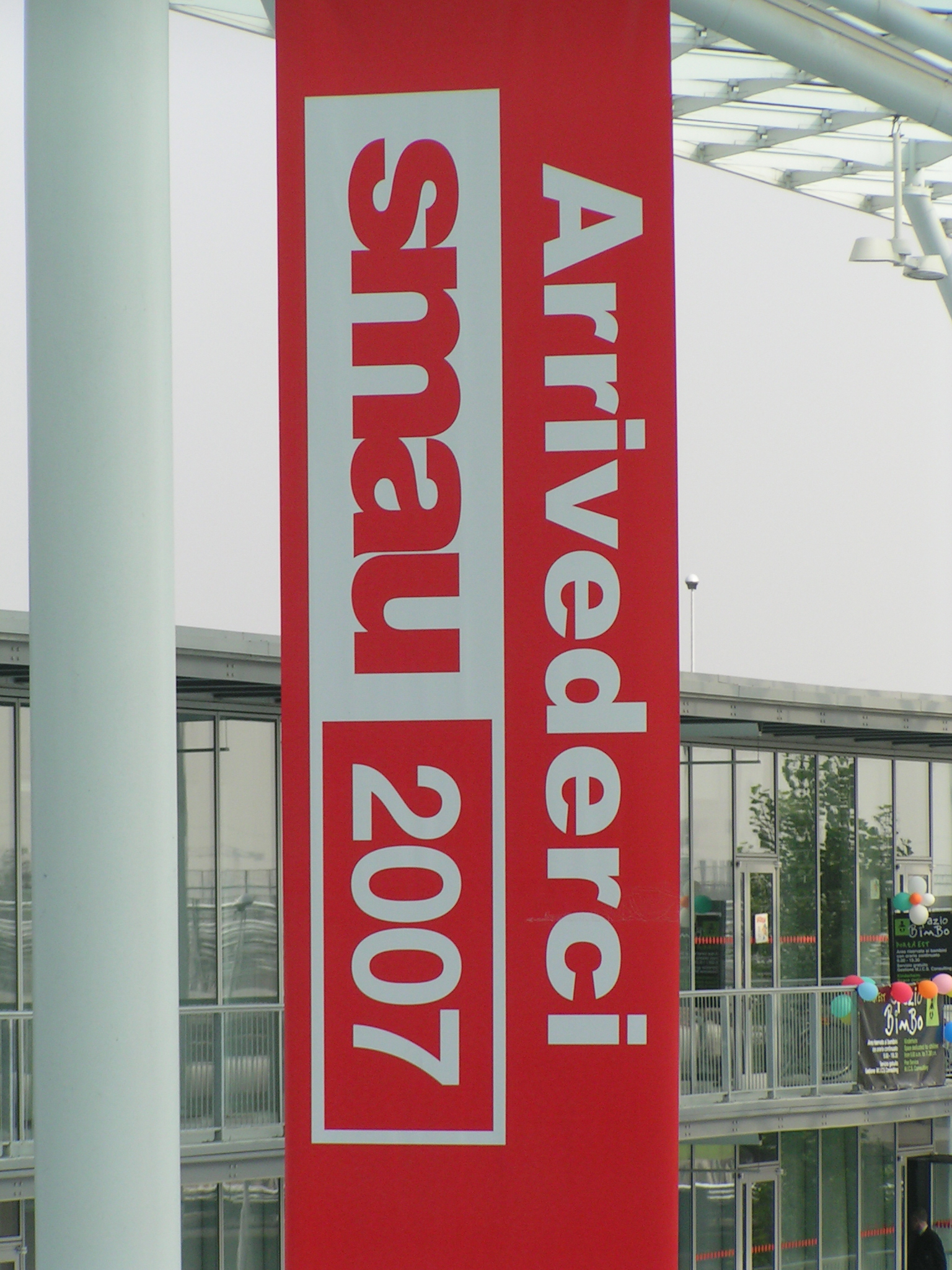 Smau 2007